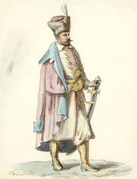 Беларуская (тарашкевіца): Ваявода (Vajavoda) Вялікага Княства Літоўскага